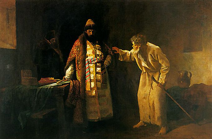 Николай Салос — псковский юродивый. В 1570 во время похода Ивана IV на Псков встретил царя у ворот города, обличая его в кровожадности и устрашая возмездием, после чего царь отошёл от Пскова.